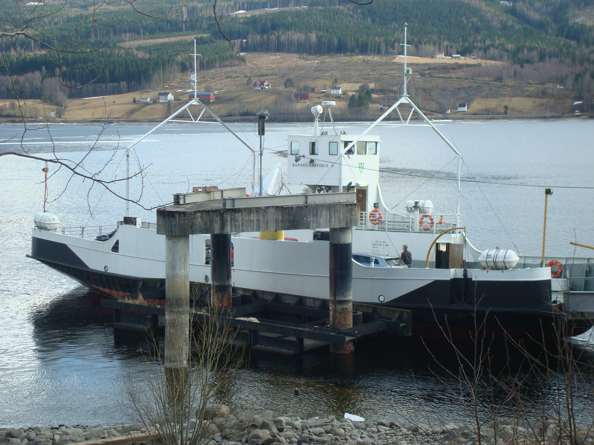 Randsfjordfergen til kai ved Horn på østsiden av Randsfjorden.